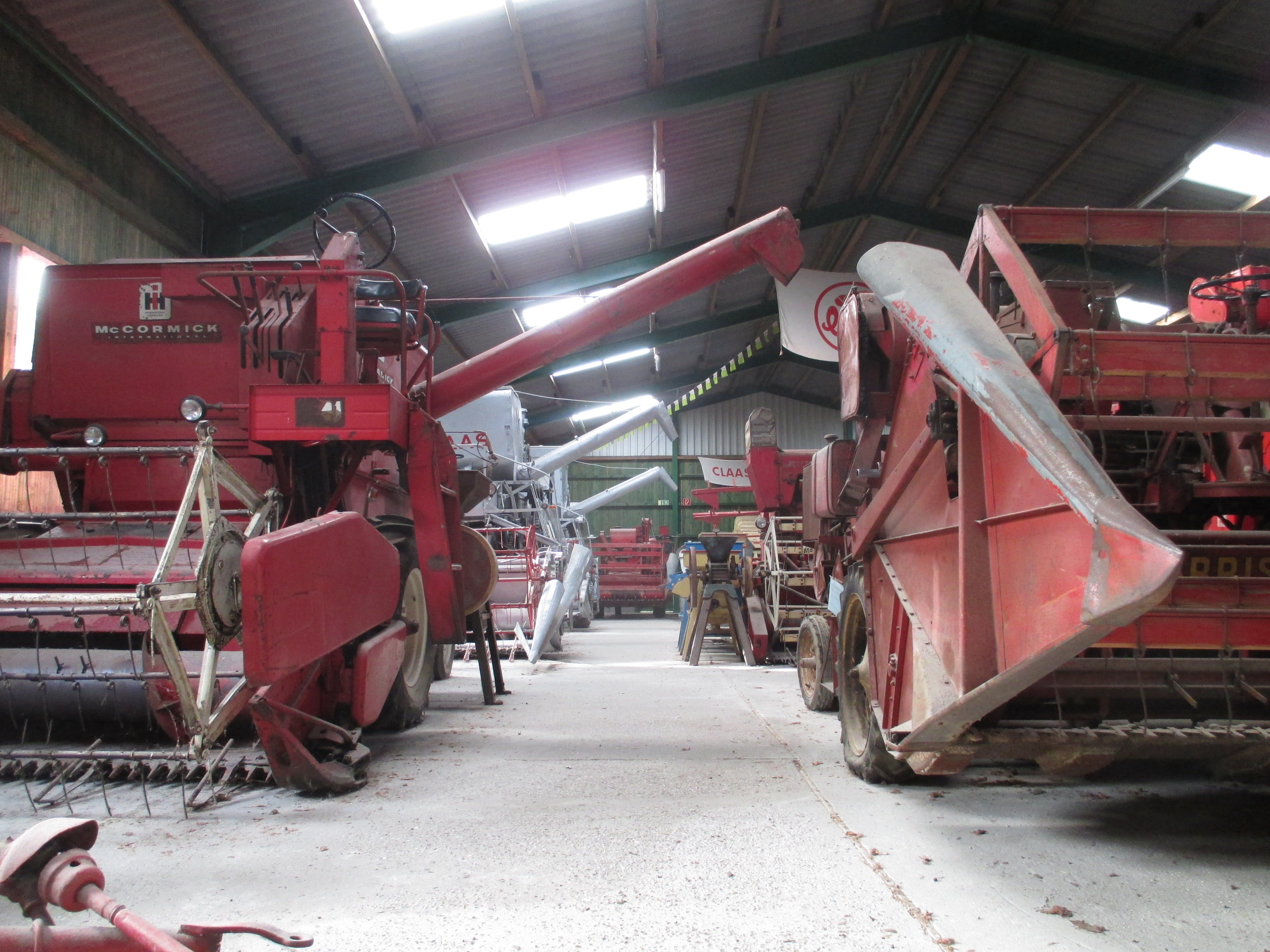 Das Traktorenmuseum Pauenhof beherbergt die größte Sammlung von Traktoren und Landmaschinen in Deutschland.